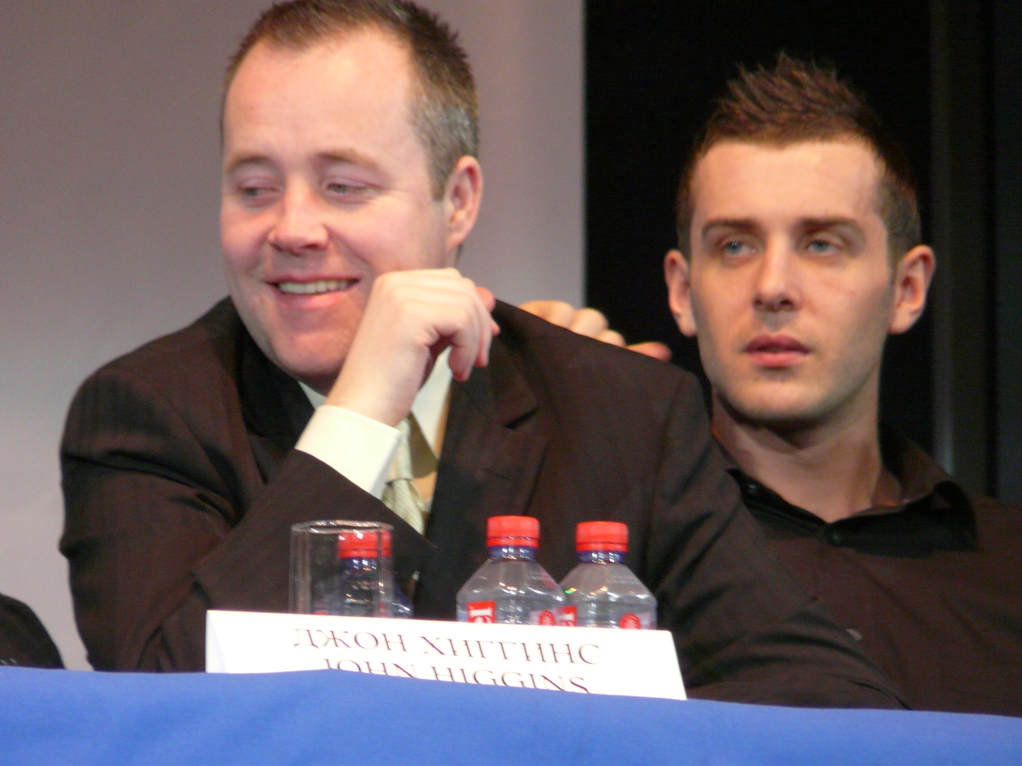 Туринир World Series of Snooker в Москве